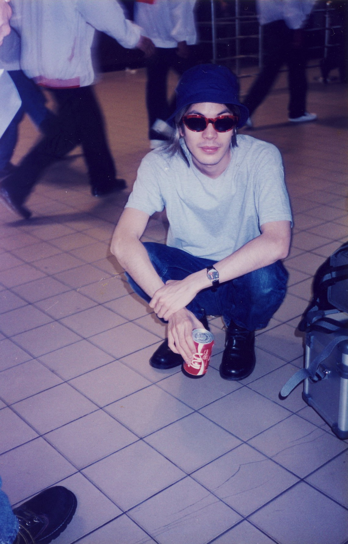 James Iha in Bangkok,Thailand